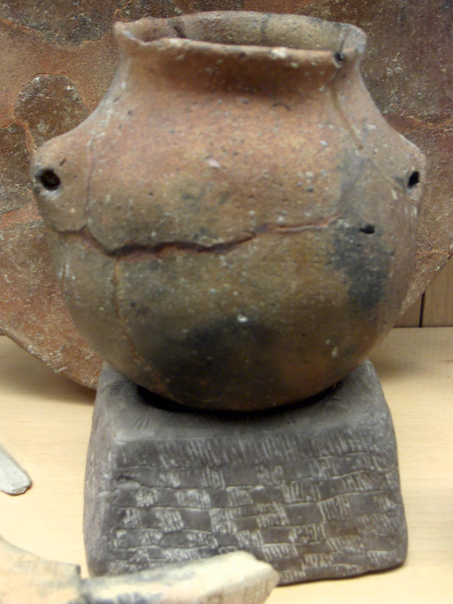 Jarre, terre cuite, néolithique, musée des antiquités nationales, Saint-Germain-en-Laye